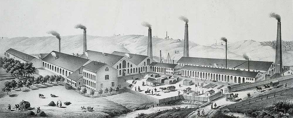 Lithografie der Hermannshütte in Dortmund Hörde um 1860